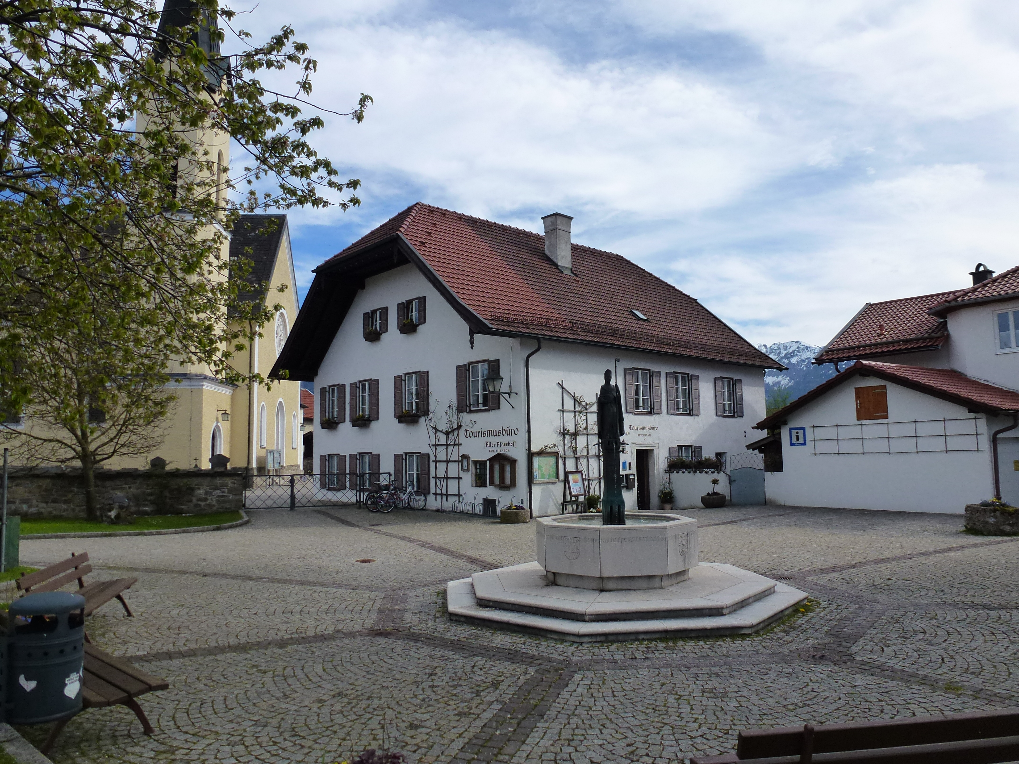 Pfarrhof - Petersplatz 2, Piding